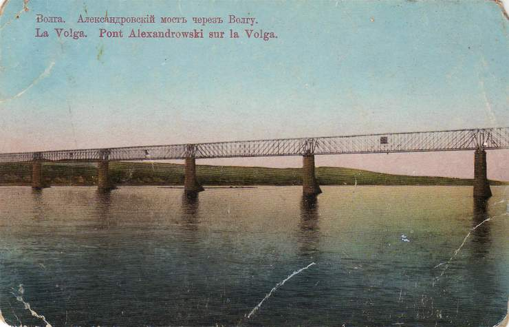 Сызранский (Александровский) мост через реку Волгу